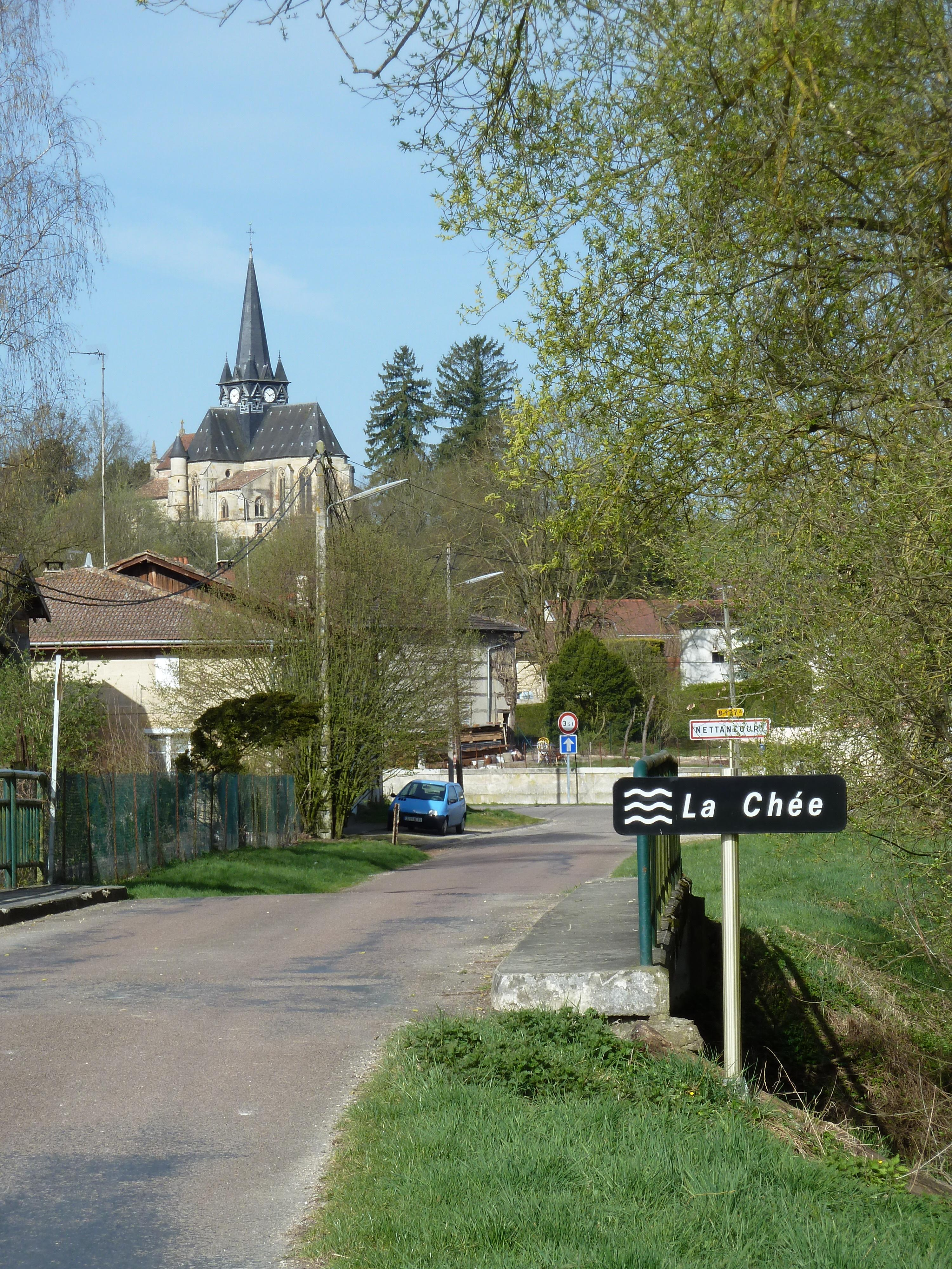 Nettancourt eglise